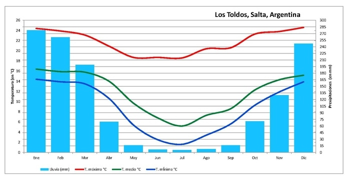 clima tropical con estacion seca